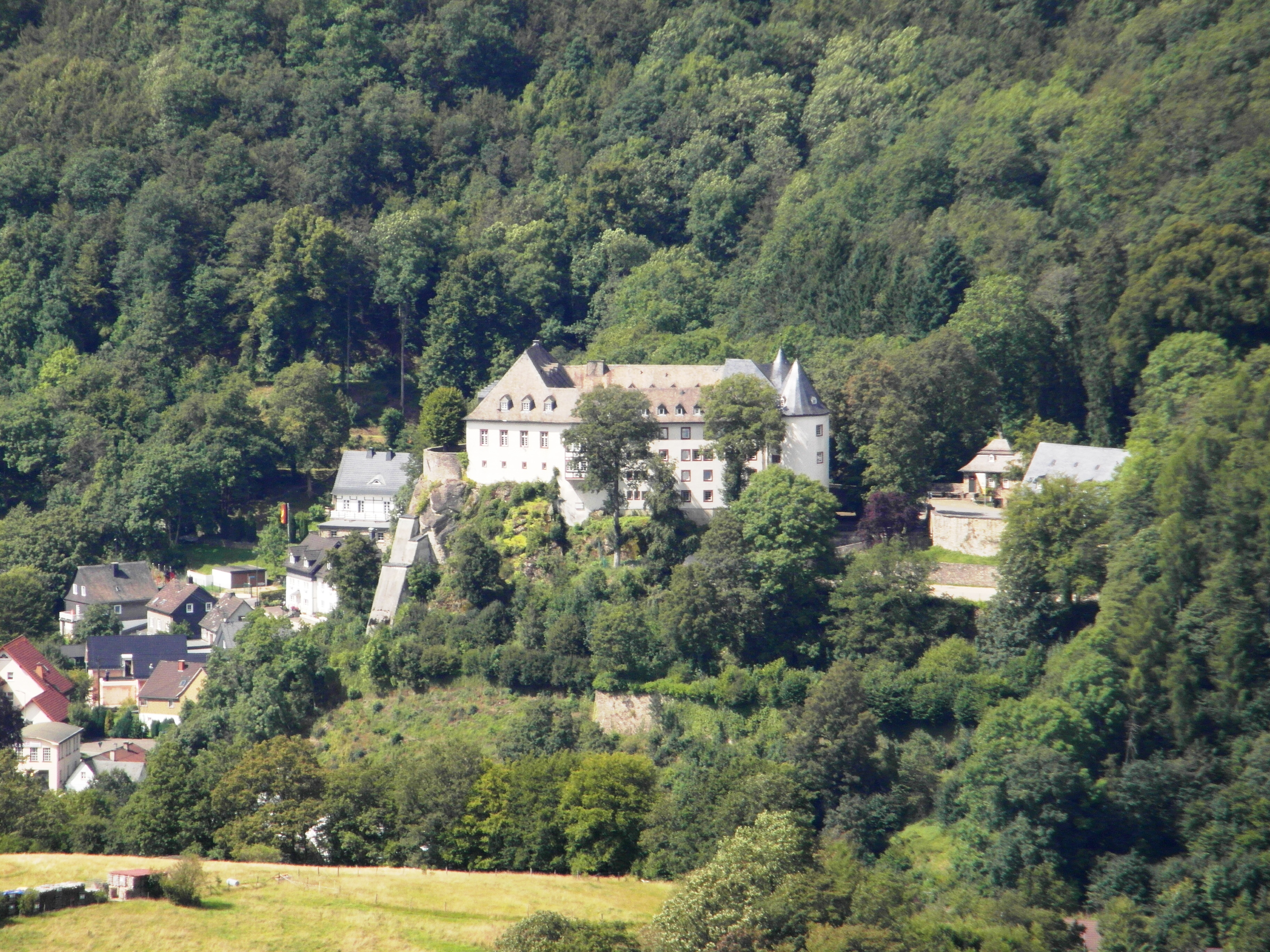 Burg Bilstein (Lennestadt) aus der Sicht des Turmes der Hohen Bracht